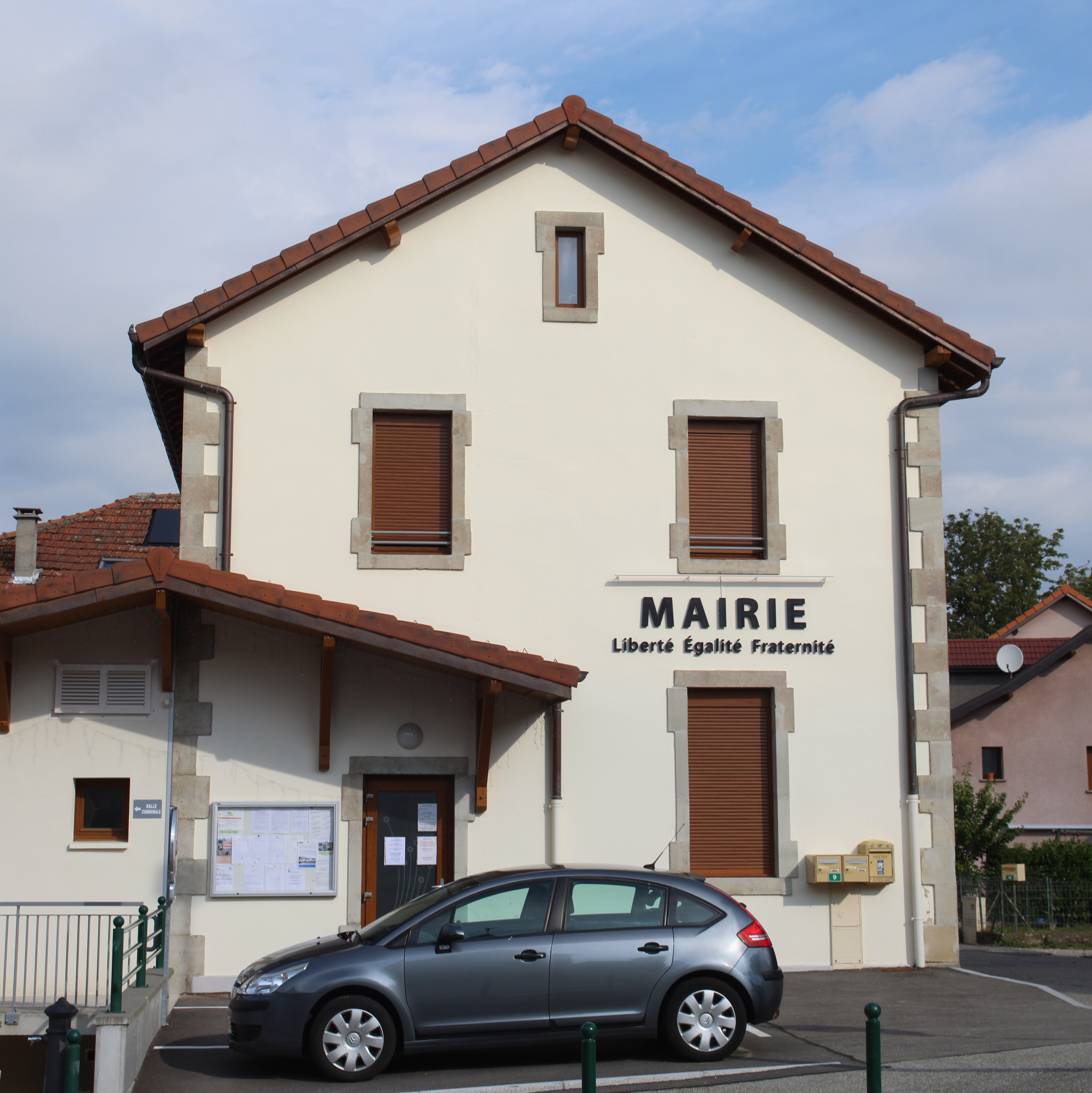 Mairie de Droisy, Haute-Savoie.